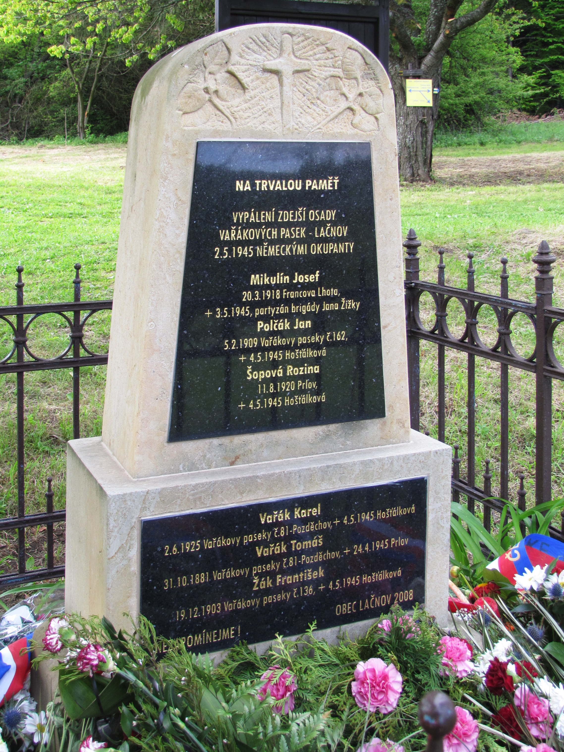 Pomník na Vařákových pasekách ve Vizovických Vrších.